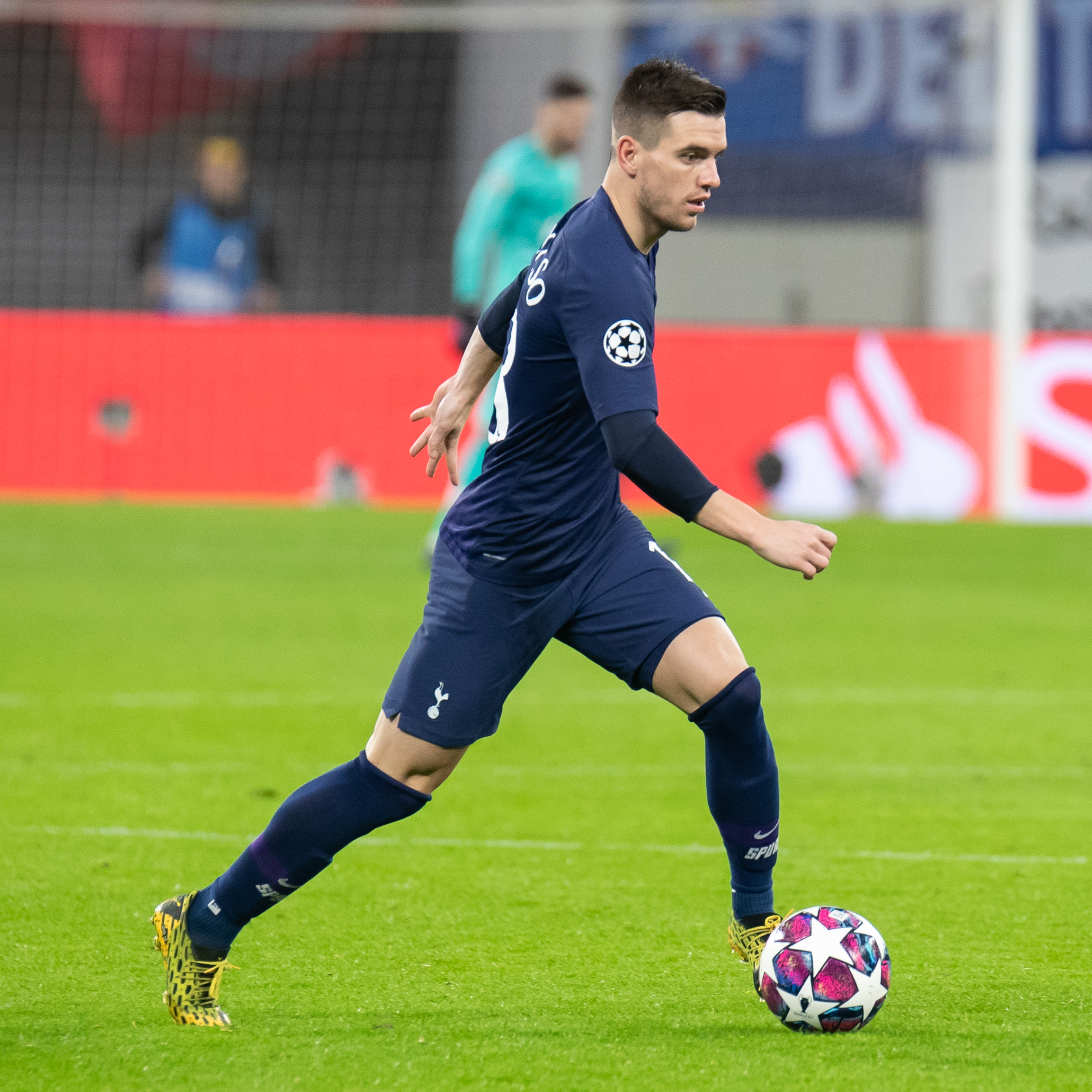 Fußball, Männer, UEFA Champions League Achtelfinale, RB Leipzig - Tottenham Hotspur; Giovani Lo Celso (Tottenham Hotspur, 18); Freisteller, Einzelbild, Aktion, action